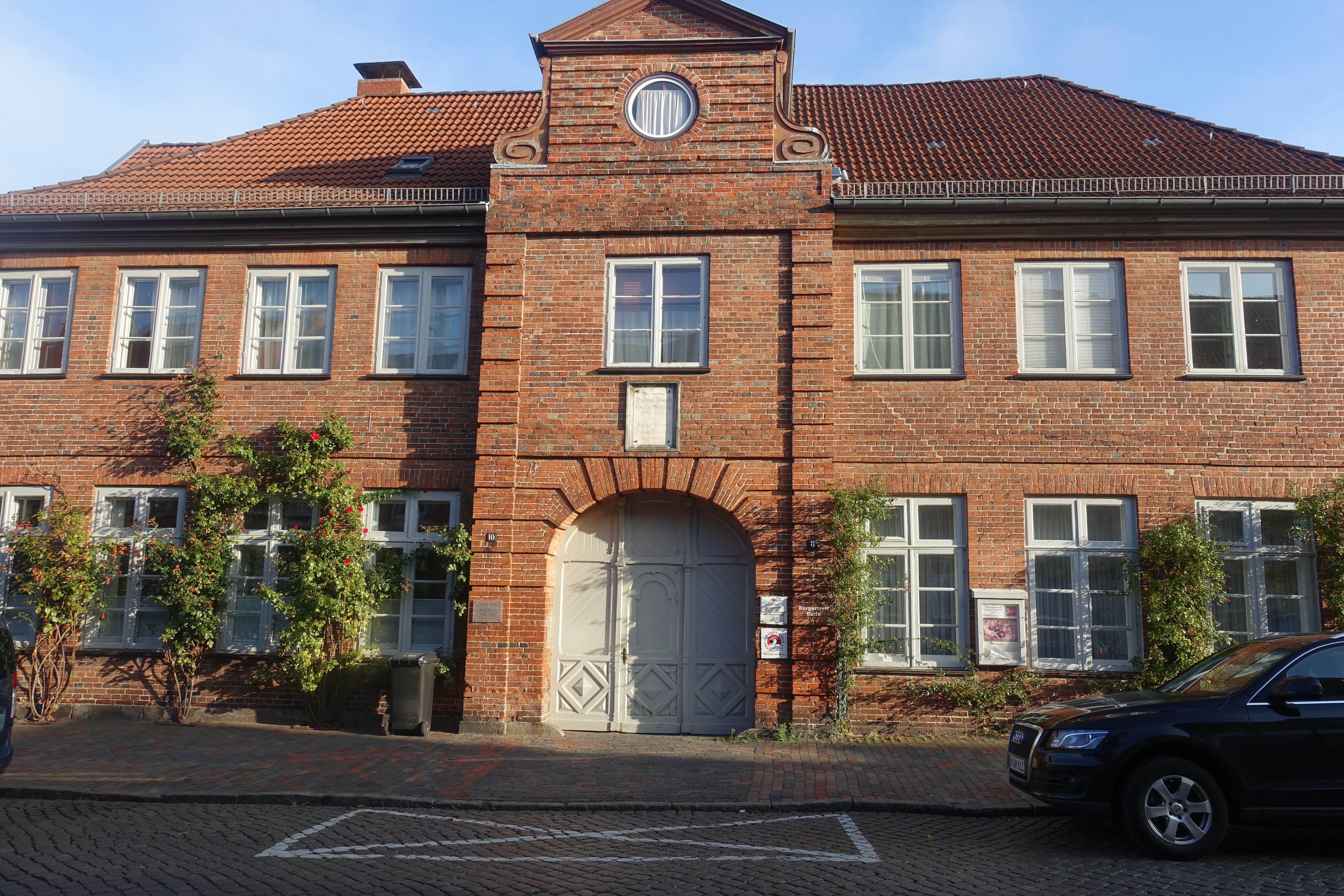 Wohnhaus von Friedrich Leopold zu Stolberg-Stolberg und danach von Johann Heinrich Wilhelm Tischbein in Eutin